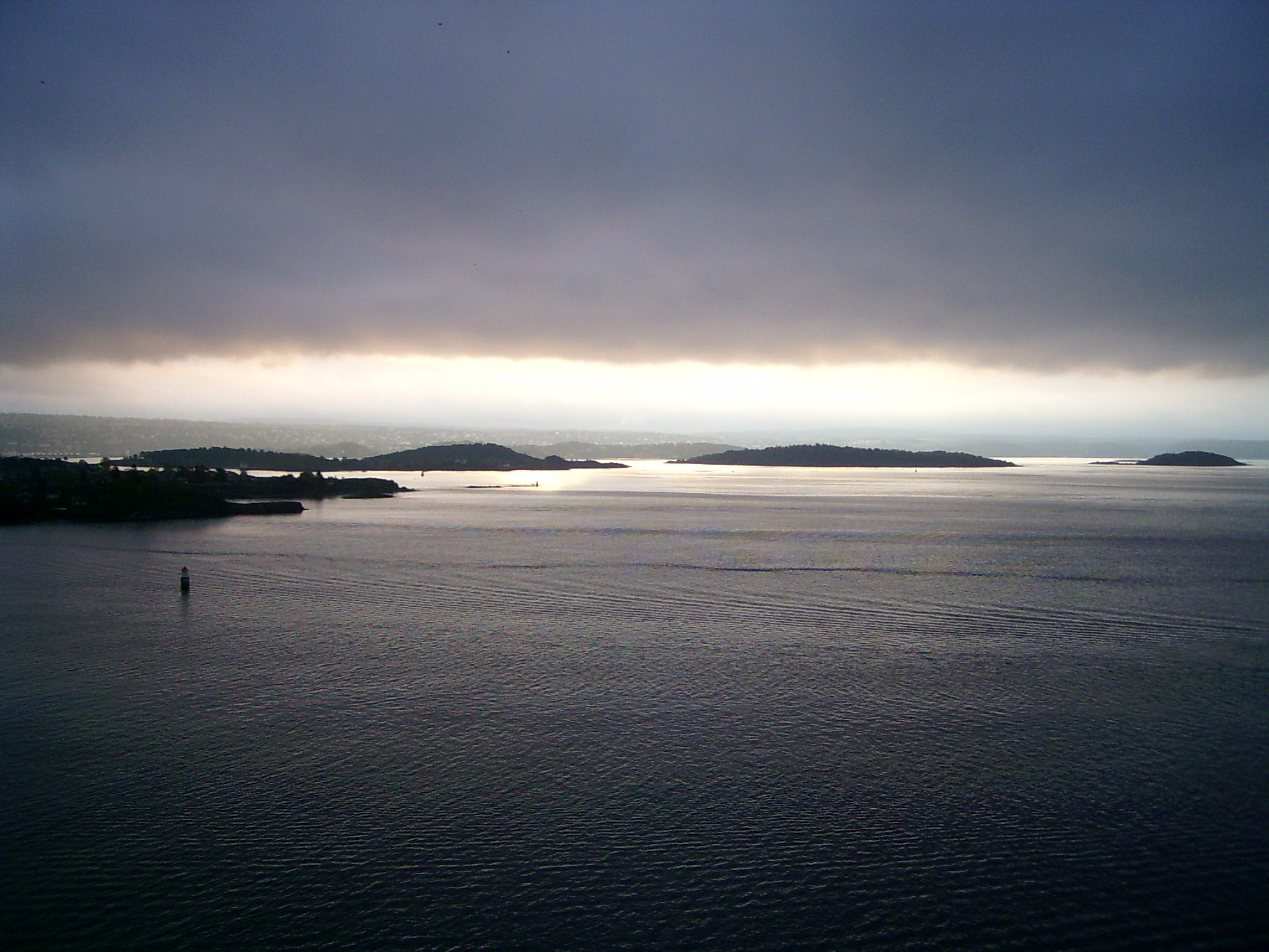 fjord of oslo